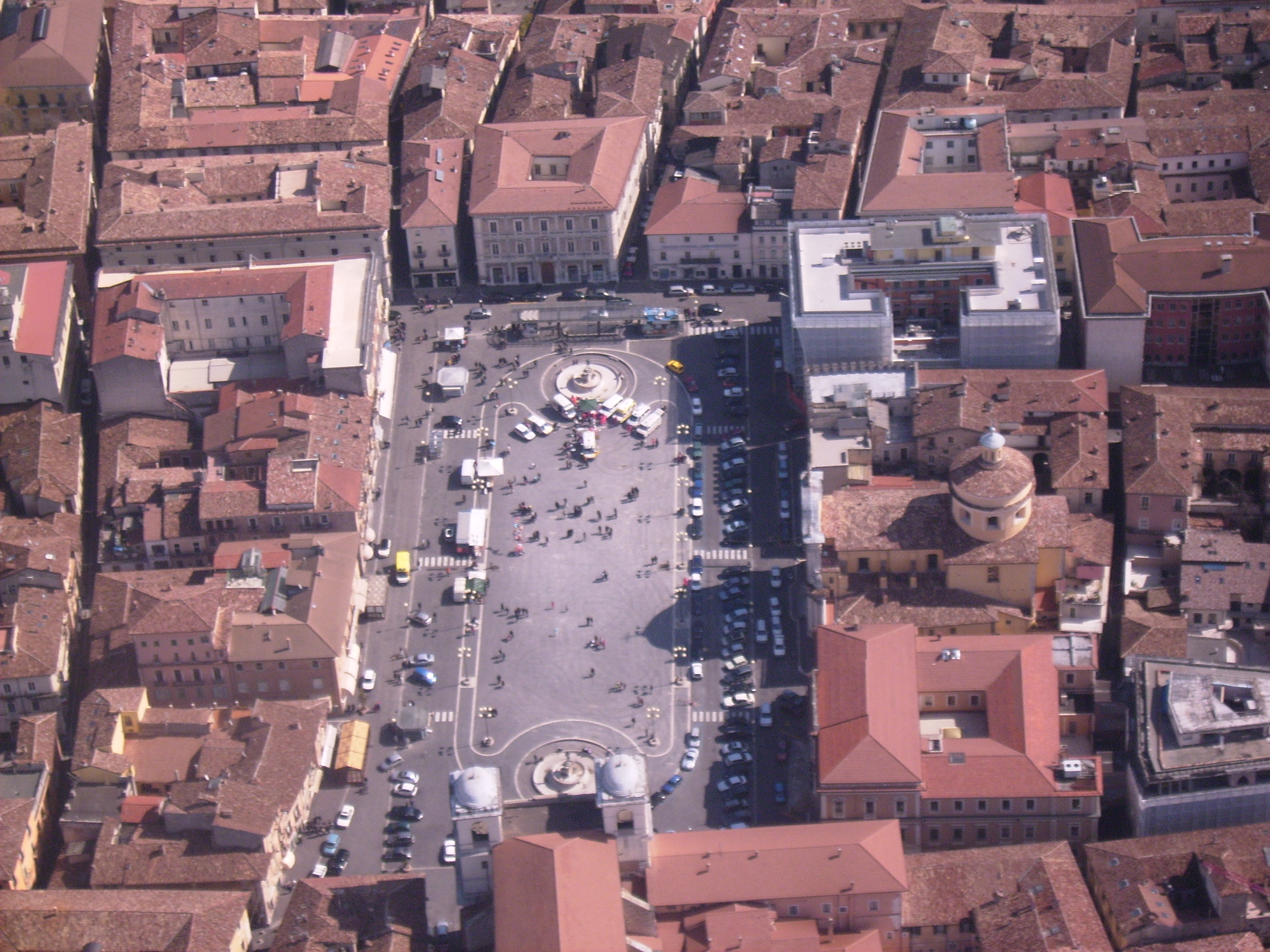 Piazza duomo L'Aquila